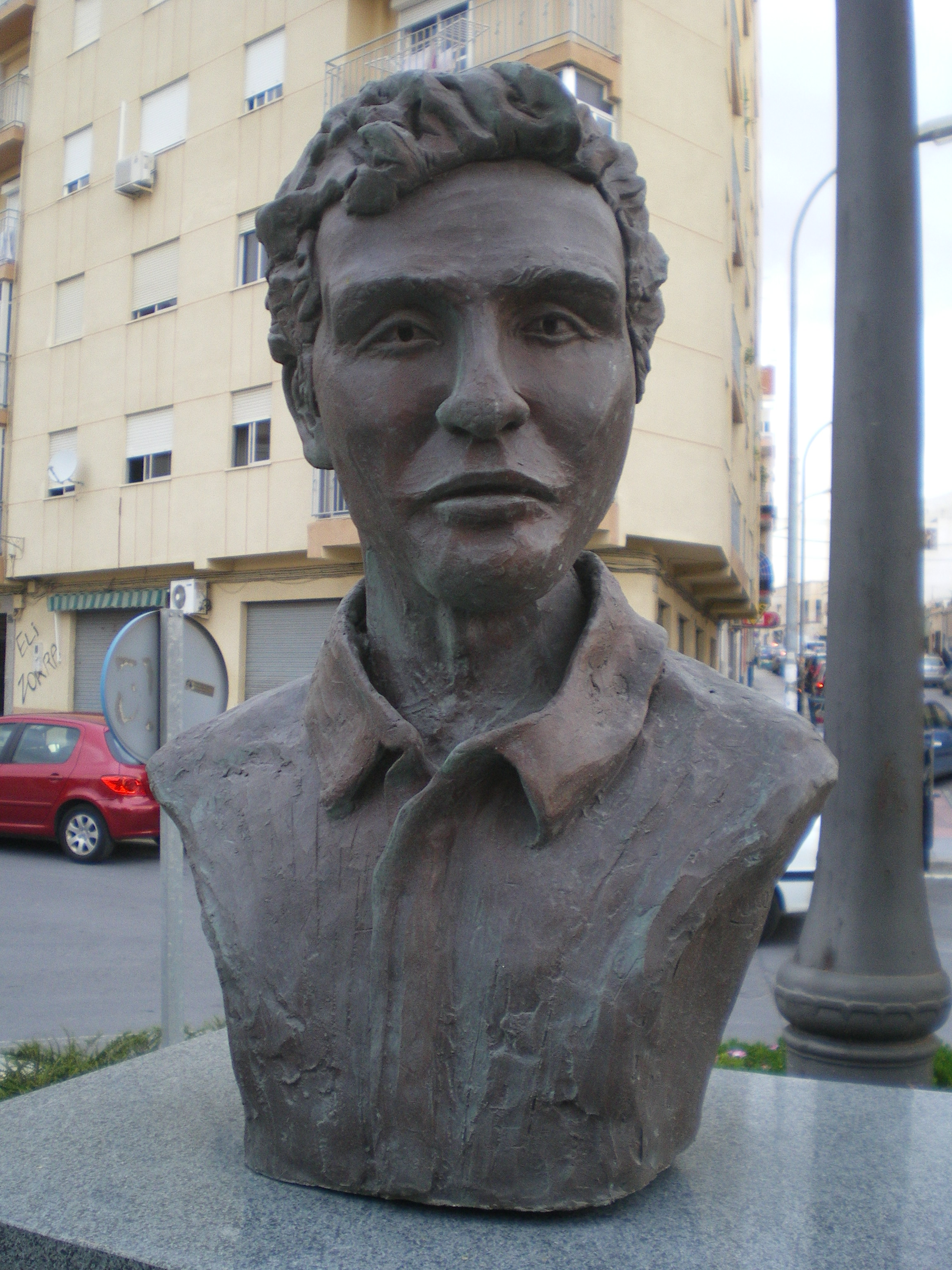 Gerundino Fernández García, constructor de guitarras almeriense; frente del busto obra de María García Pérez, ubicado en la plaza del Quemadero, Almería (España).